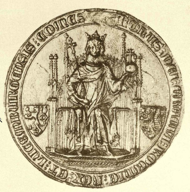 This is a scan of the historical document: Title: Die Siegel der deutschen Kaiser und Könige v. 1 (751 - 1347)